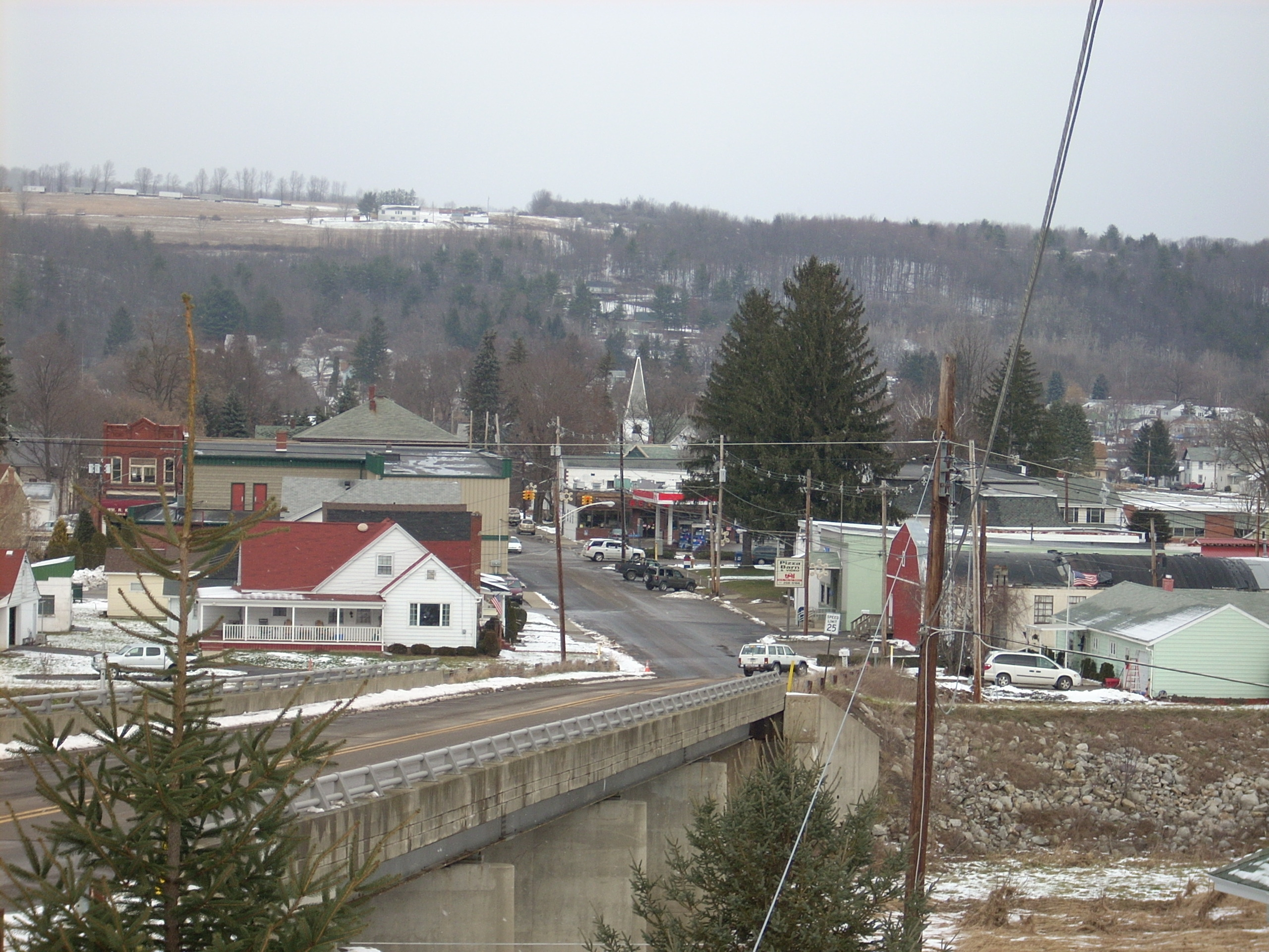 Elkand, PA